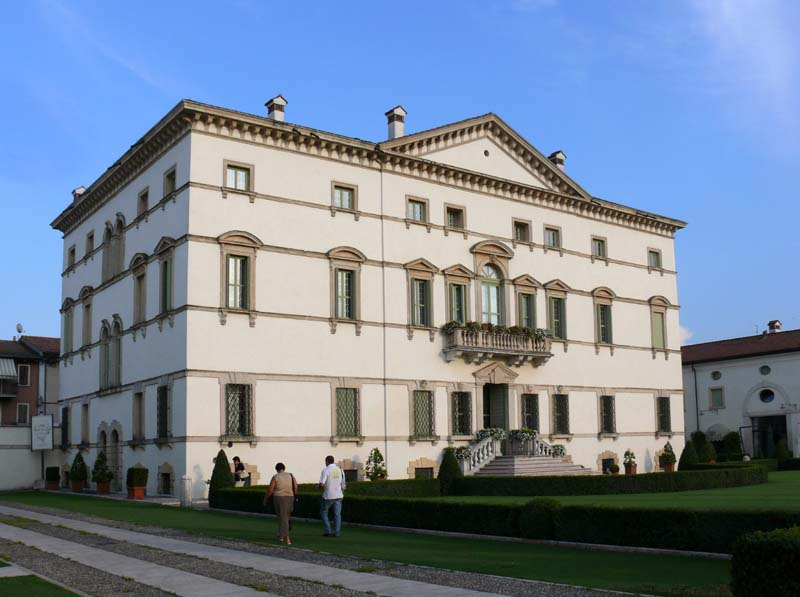 Villa Vecelli Cavriani a Mozzecane (facciata verso il brolo)